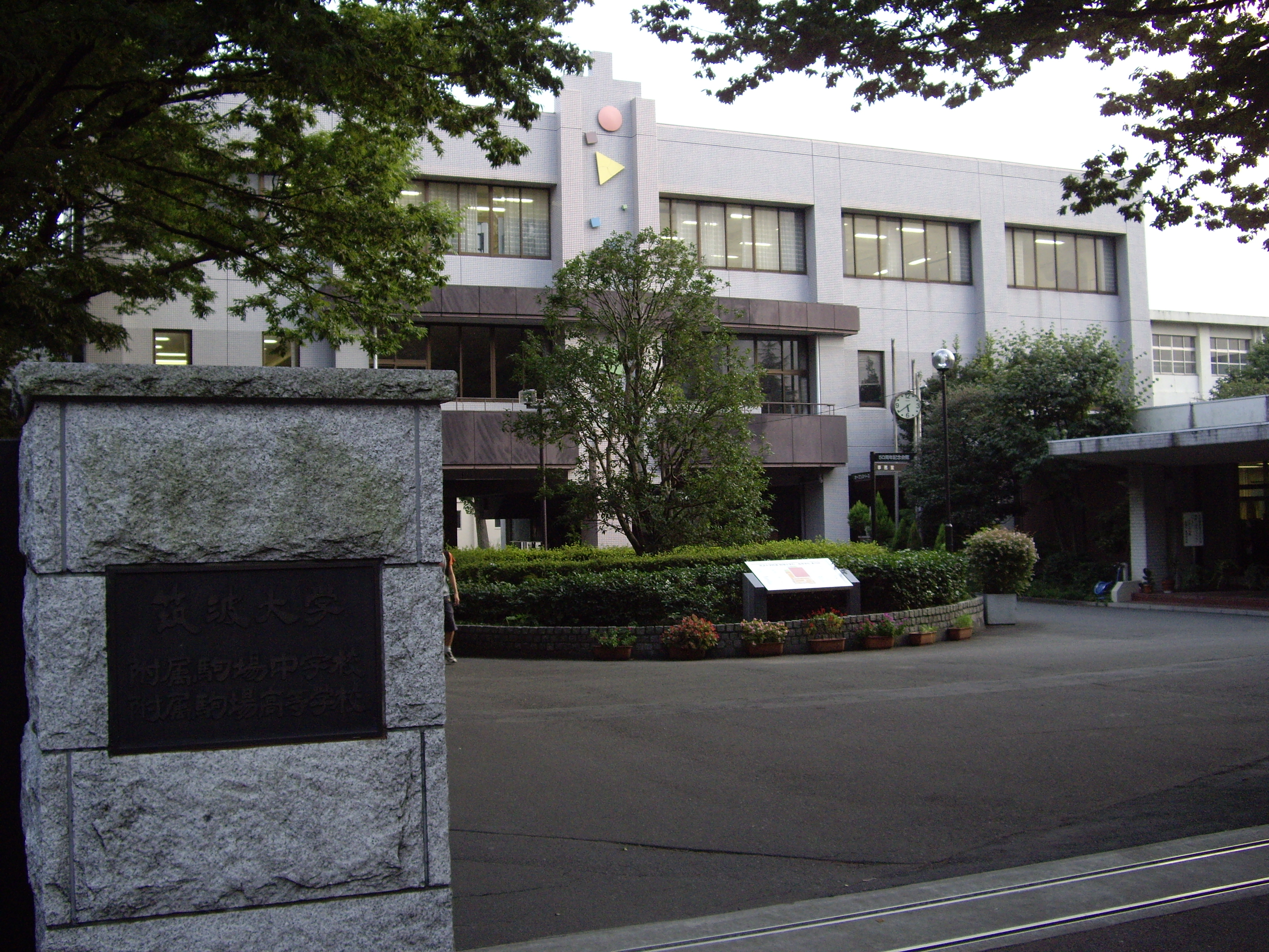 筑波大学附属駒場中学校・高等学校の外観 2006-09-05に投稿者 (Benjamin58) が撮影。